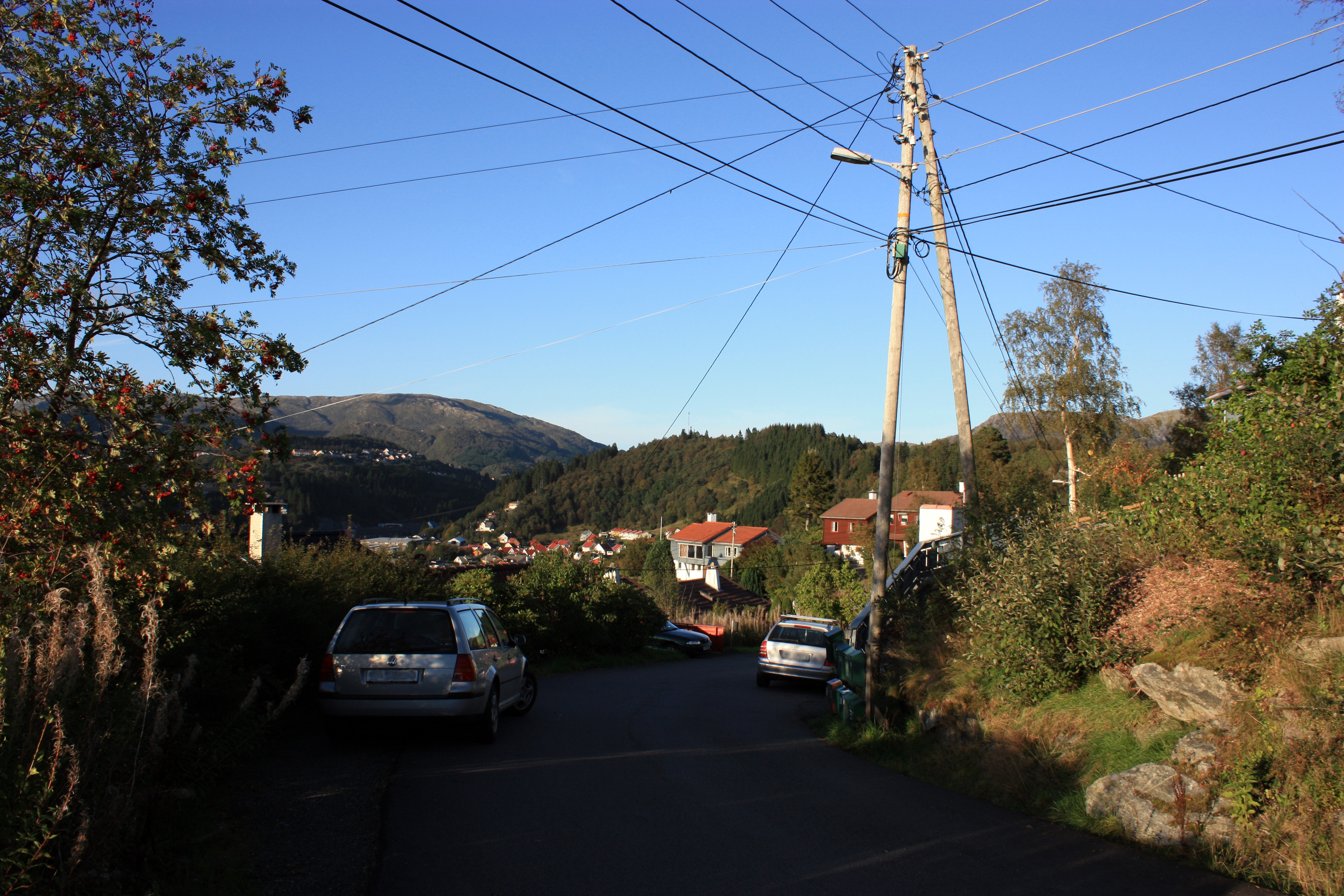 Øvsttunåsen, Fana, Bergen.